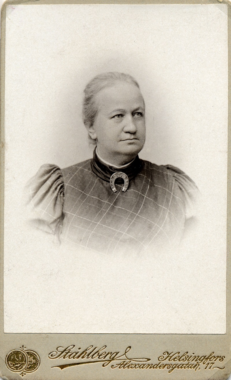 Fredrika Wetterhoff, K. E. Ståhlbergin valokuva